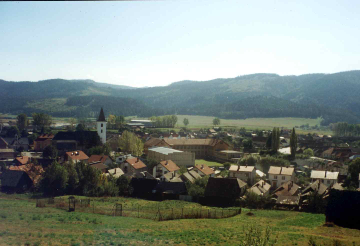 Autor: --Lojzo 07:24, 20 január 2006 (UTC) Kategória:Presunúť_na_Commons Kategória:Panorámy